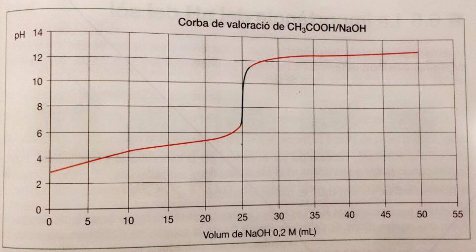 corba de valoració miriam s